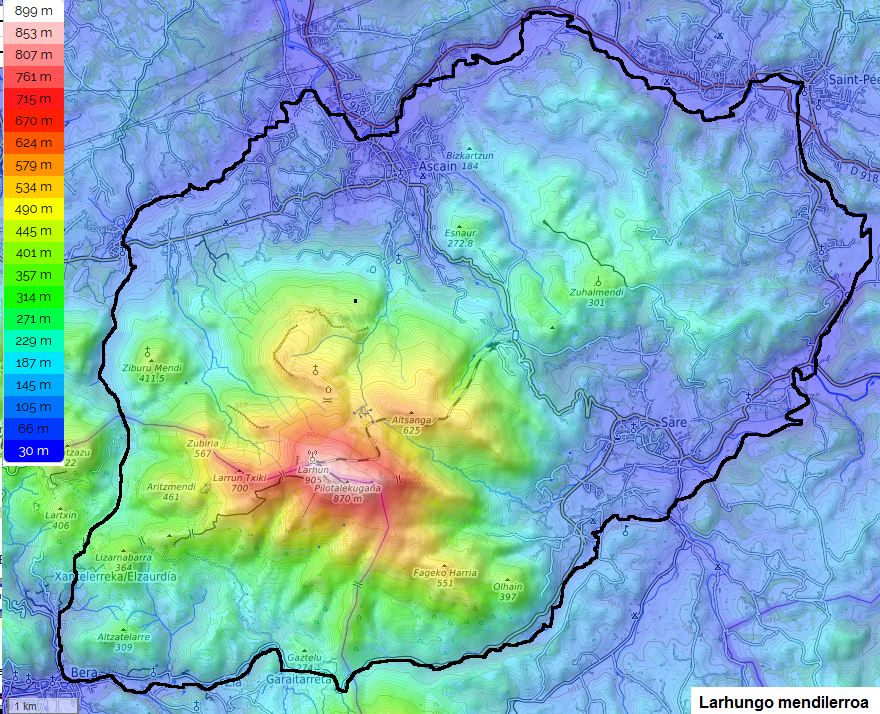 Larhungo mendilerroaren mapa topografikoa.